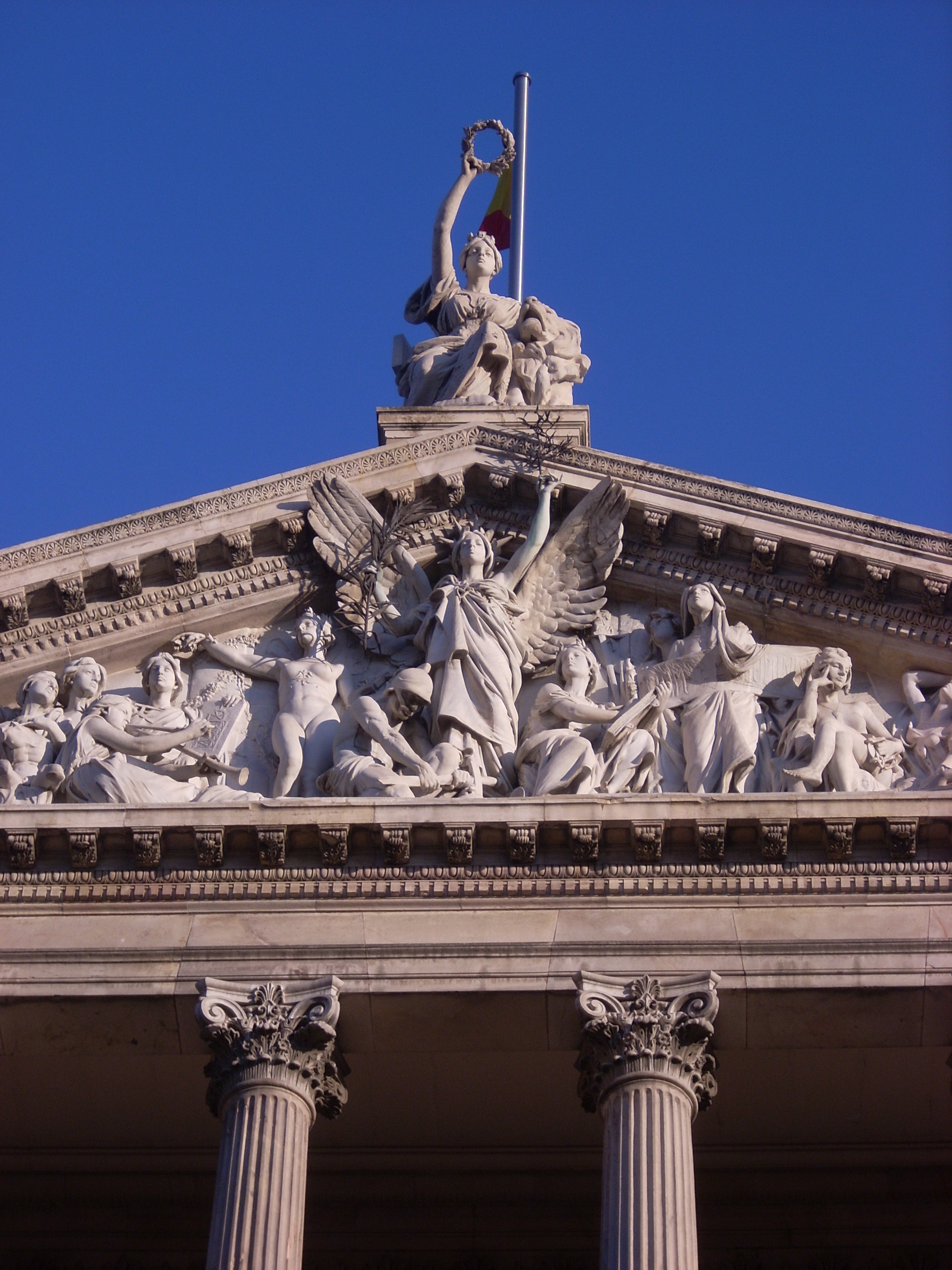 Detalle de la fachada de la Biblioteca Nacional de España, en el Paseo de Recoletos, Madrid.